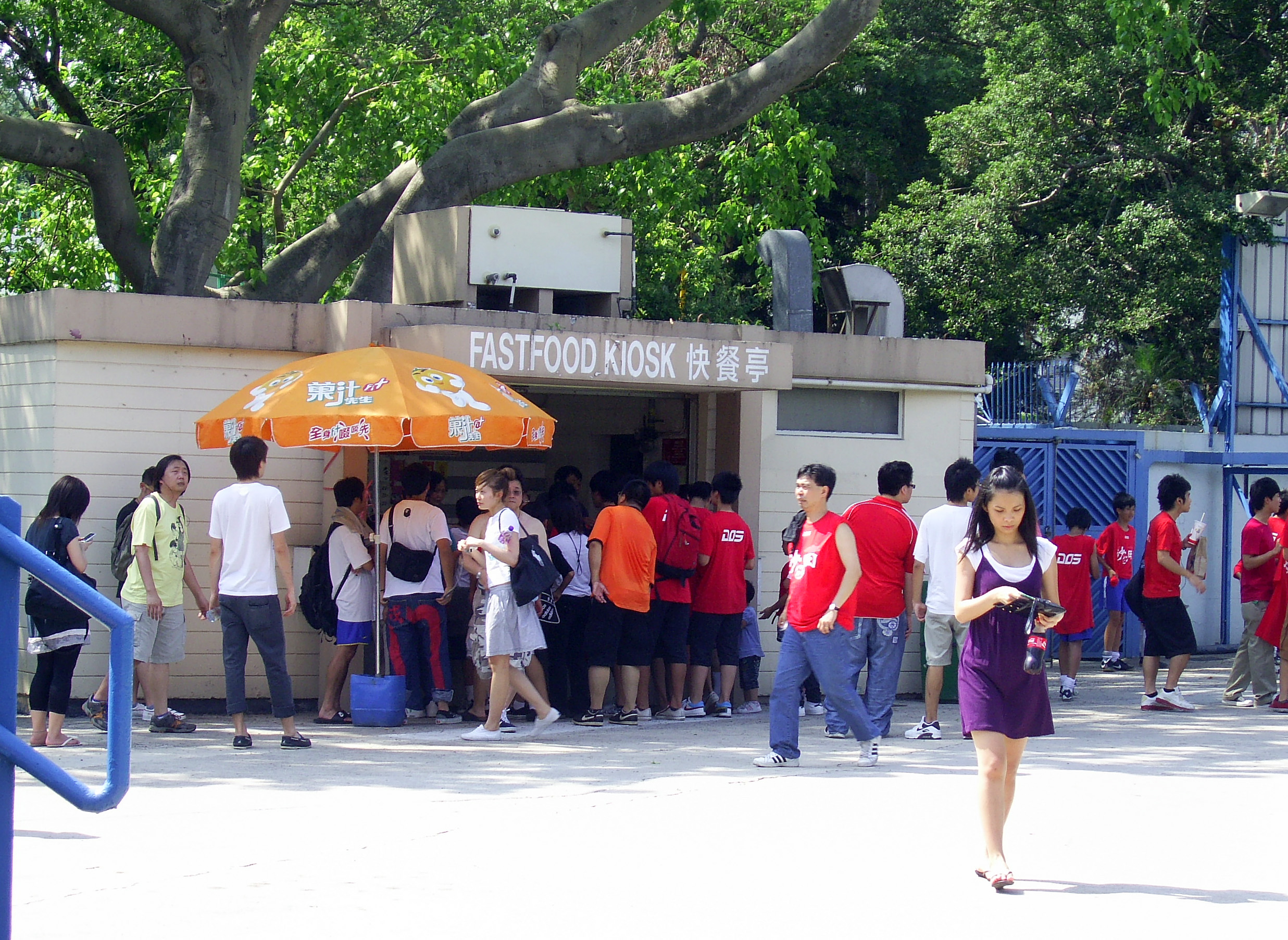 中文（香港）: 旺角大球場快餐售賣亭